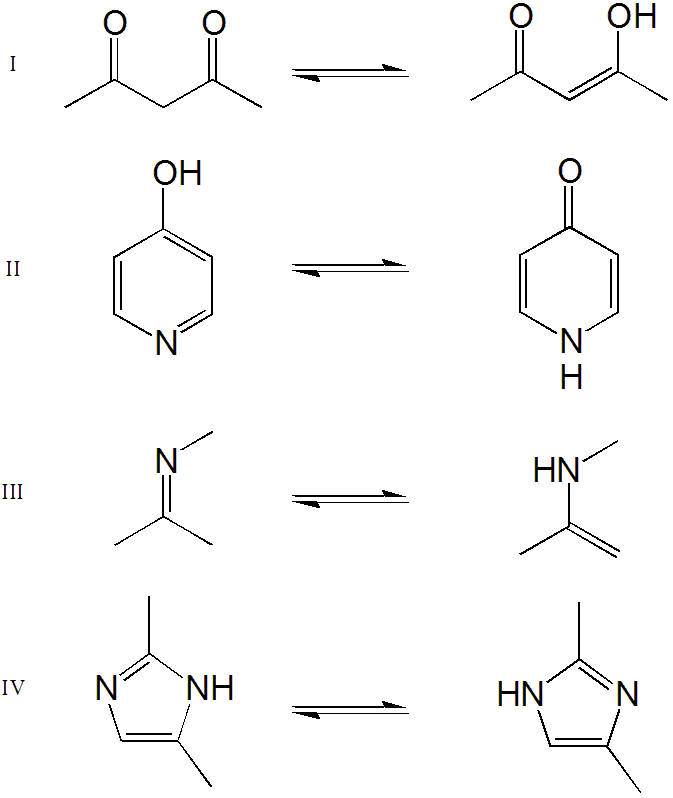 Struktur: Tor Svensson